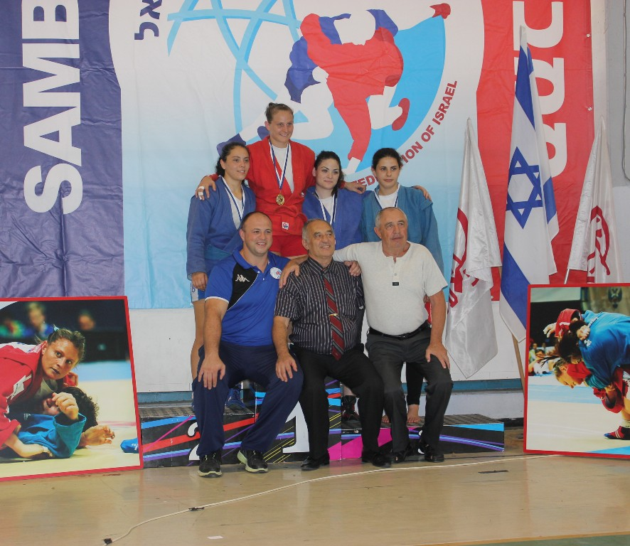 Чемпионат Израиля по самбо. 2014